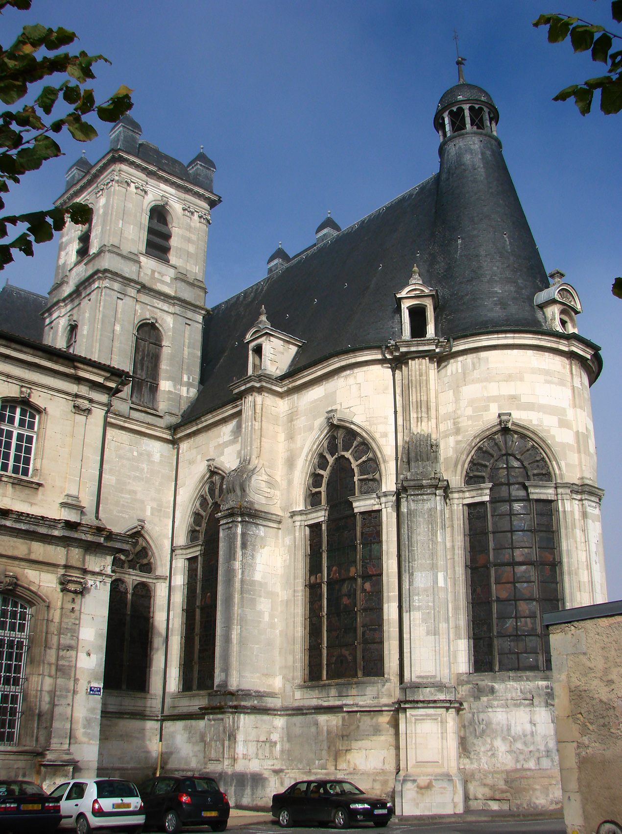 Chevet de l'église abbatiale Saint-Michel à Saint-Mihiel, fin du 17ème siècle.